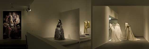 Overzichtstentoonstelling in het Centraal Museum, Utrecht, 25-11-2008 t/m 08-02-2009